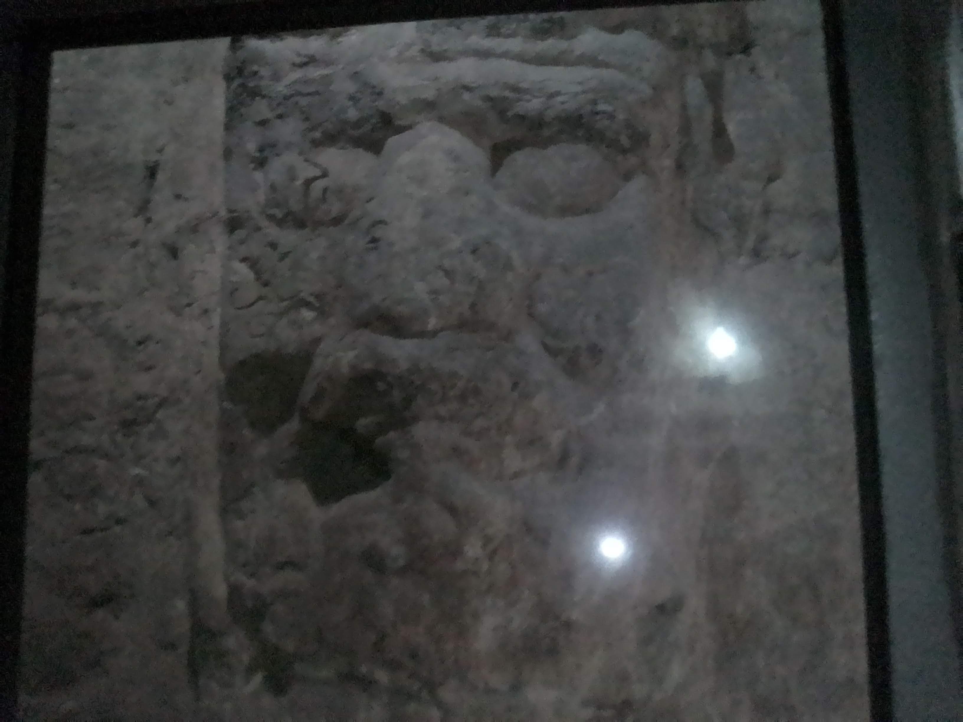 mascaron de estuco